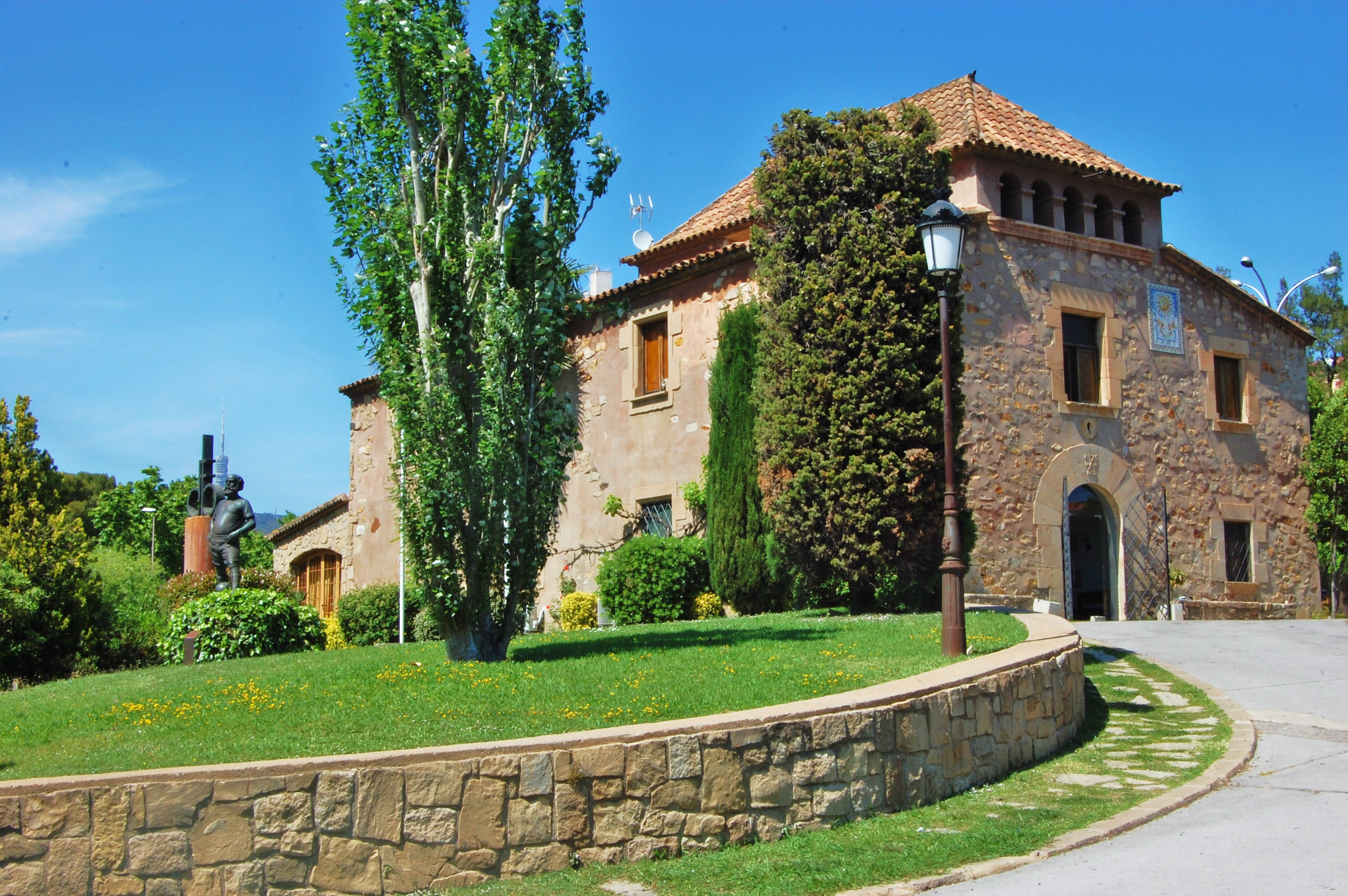 La Masia (Can Planas) (Barcelona)